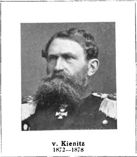 Wilhelm Ferdinand Hermann von Kienitz (* 23. März 1823 in Münster; † 16. August 1910 in Berlin) war königlich preußischer Generalleutnant und Kommandeur des 68. Infanterieregiments